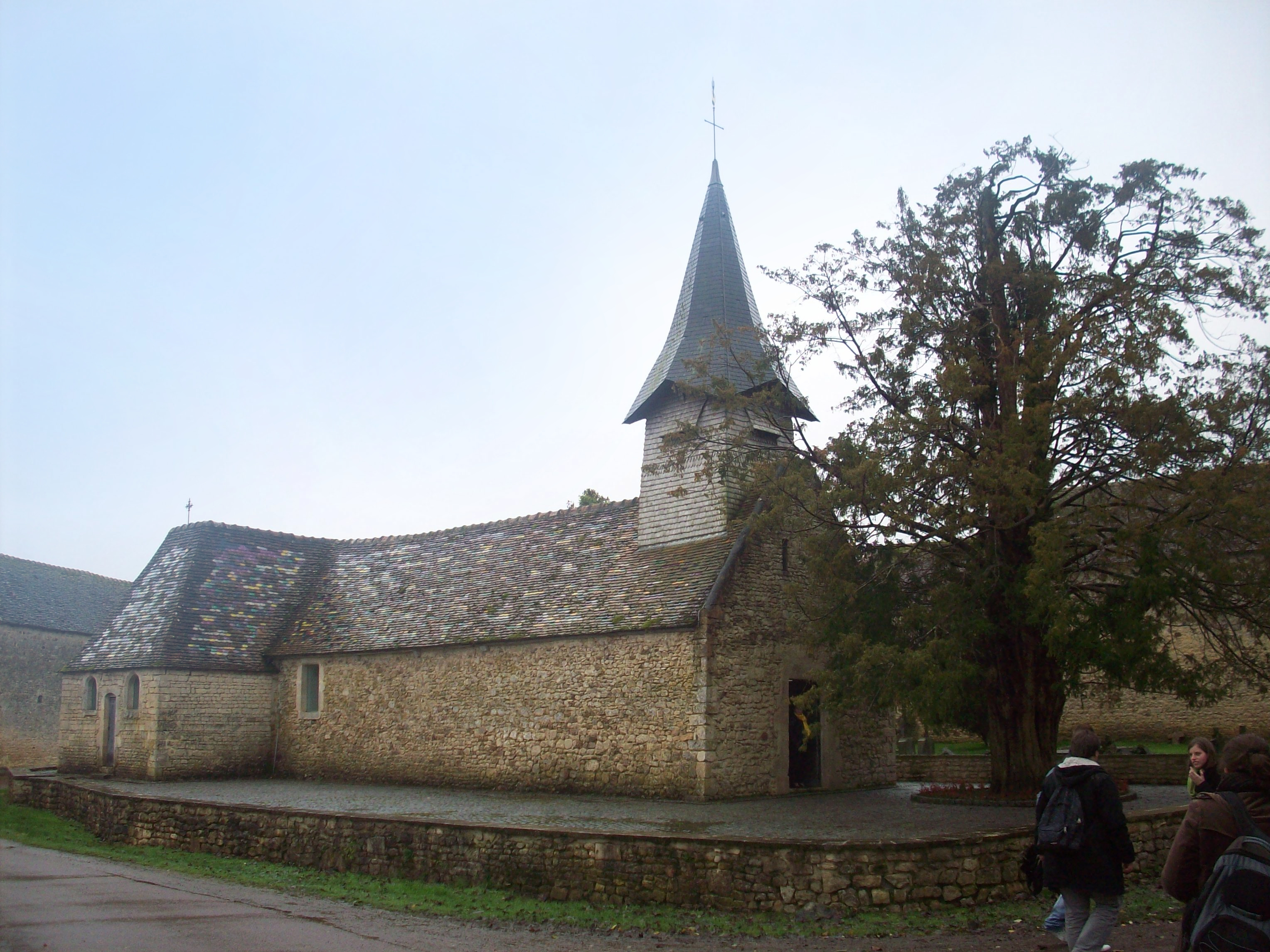 Chapelle Saint Vigor de Mieux